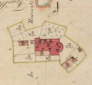 Serrabona, de Bula d'Amunt, en el Cadastre napoleònic del 1812 (Arxius Departamentals dels Pirineus Orientals)